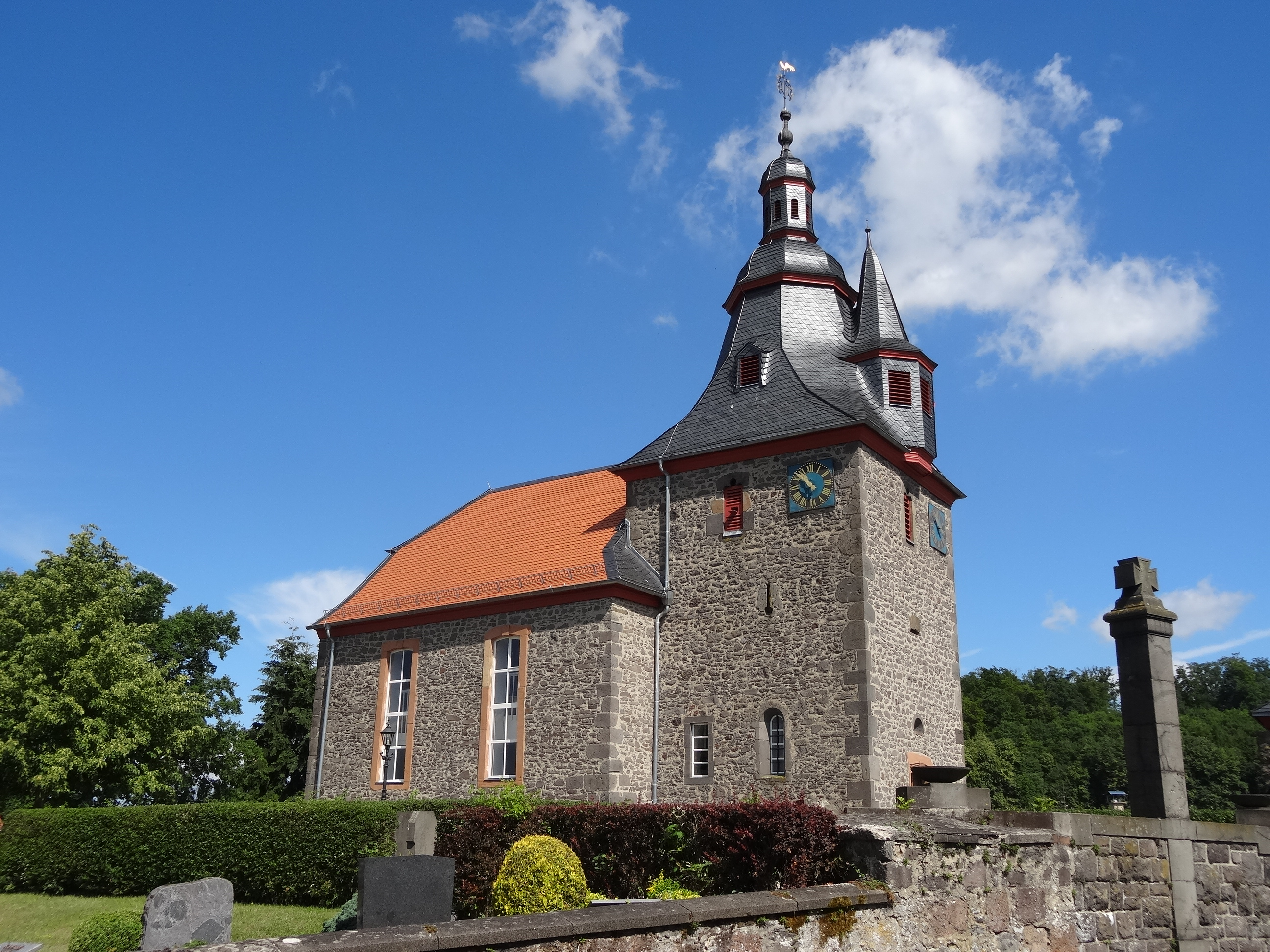 Evangelische Kirche Nonnenroth (Hungen)